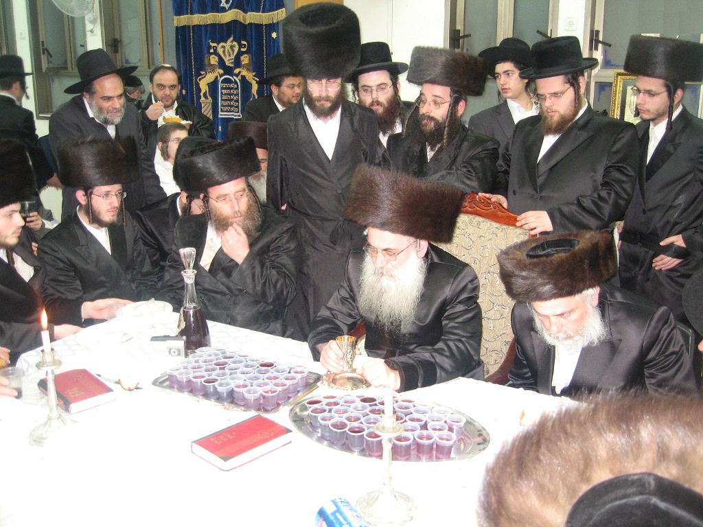 בהילולת זקינו הרה"ק רבי אליעזר זאב מבוטשעטש זי"ע